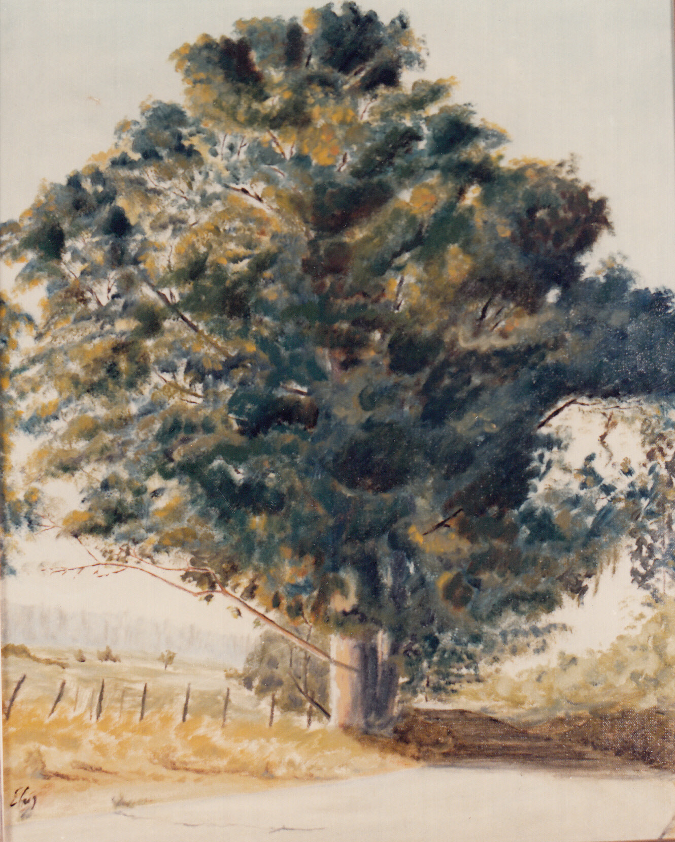 Pintura de Eugenio Cruz Vargas (1923 - 2014). Técnica: óleo sobre tela. Tema: árbol eucaliptus en el antiguo camino al balneario costero de Viña del Mar al norte de Valparaíso. Medidas: 80 x 50 cm. Autora de la fotografía: Liliana Fuentes, quien por el consentimiento del propietario titular de los derechos de autor de la obra, publica esta fotografía en internet bajo la Licencia de Uso Creative Commons, Atribución-Compartigual 3.0 Unported (CC BY-SA 3.0).